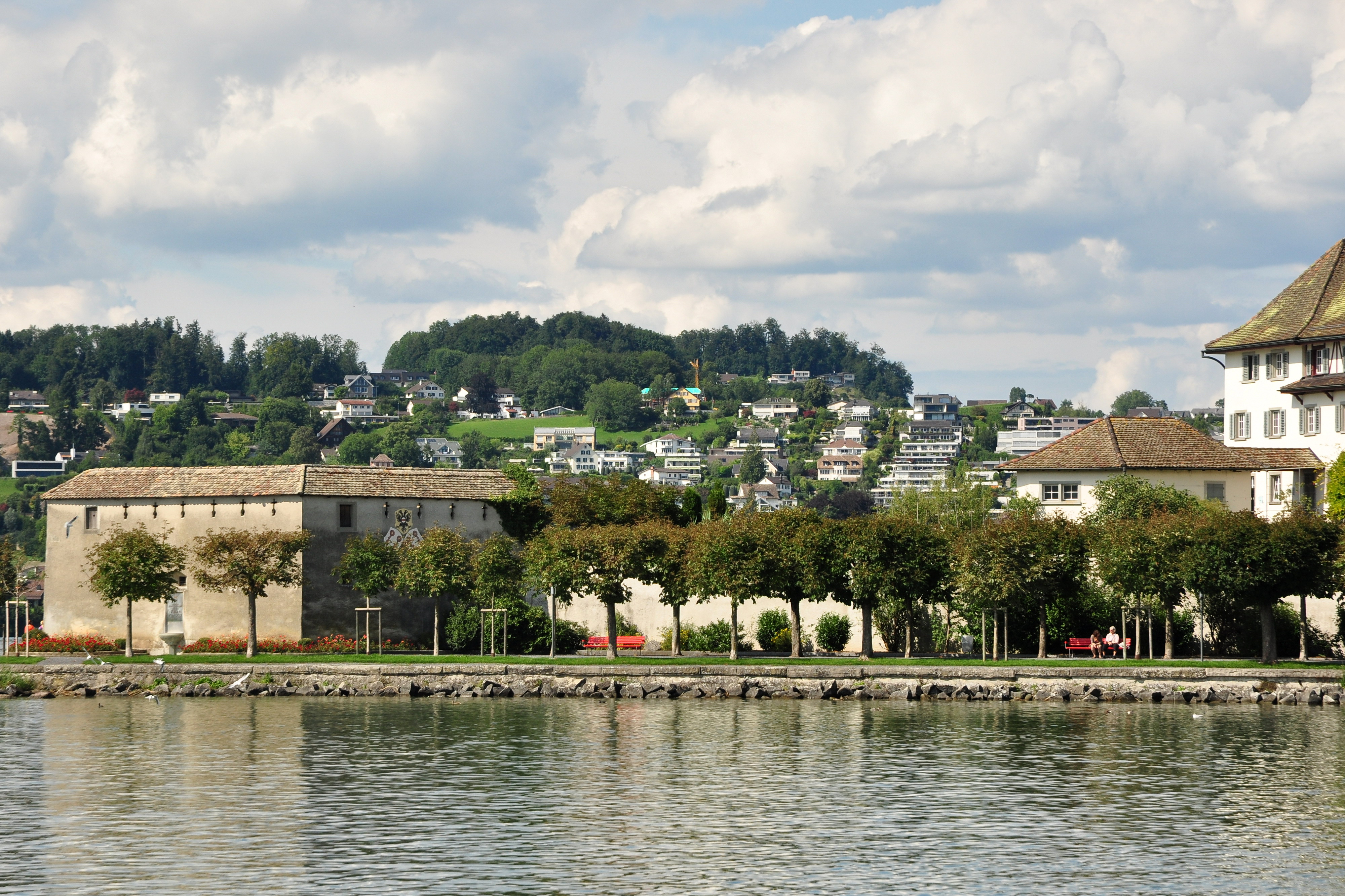 Rapperswil (Switzerland) : Endingerhorn fortification and Kapuzinerkloster, as seen from Zürichsee-Schifffahrtsgesellschaft (ZSG) motorship Wädenswil, Kempraten in the background.